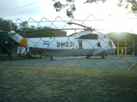 2-H-231